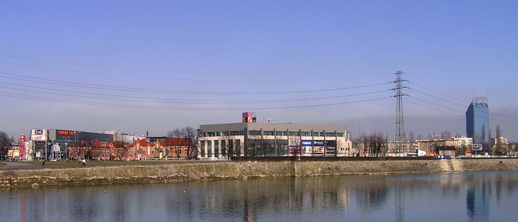 Galeria Kazimierz i Błękitek z Zabłocia (Kraków)